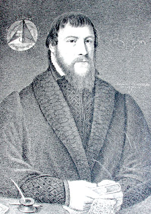 Anders Sørensen Vedel - født 9. november 1542 i Vejle (deraf tilnavnet), død 13. februar 1616 i Ribe - var præst og historiker.